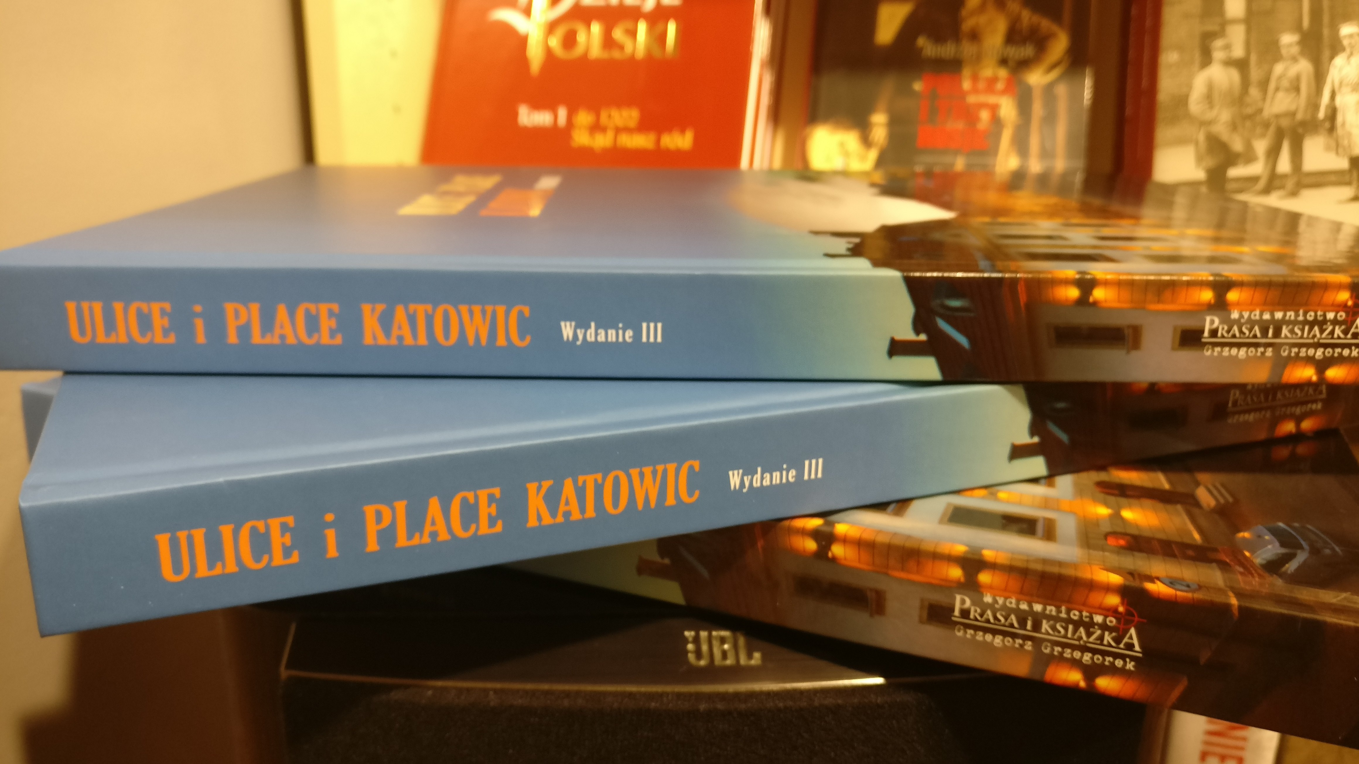 Okładki i ranty książki "Ulice i place Katowic - wydanie III" (autor: Michał Bulsa, redakcja: Grzegorz Grzegorek, zdjęcia: Piotr Tabaczyński, wstęp: Henryk Waniek; Katowice 2018).